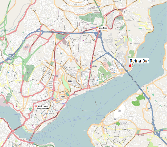 2017 Istanbul nightclub shooting (Reina Club) This map of Beyoğlu, Şişli and Beşiktaş, Reina Bar was created from OpenStreetMap project data, collected by the community. This map may be incomplete, and may contain errors. Don't rely solely on it for navigation.